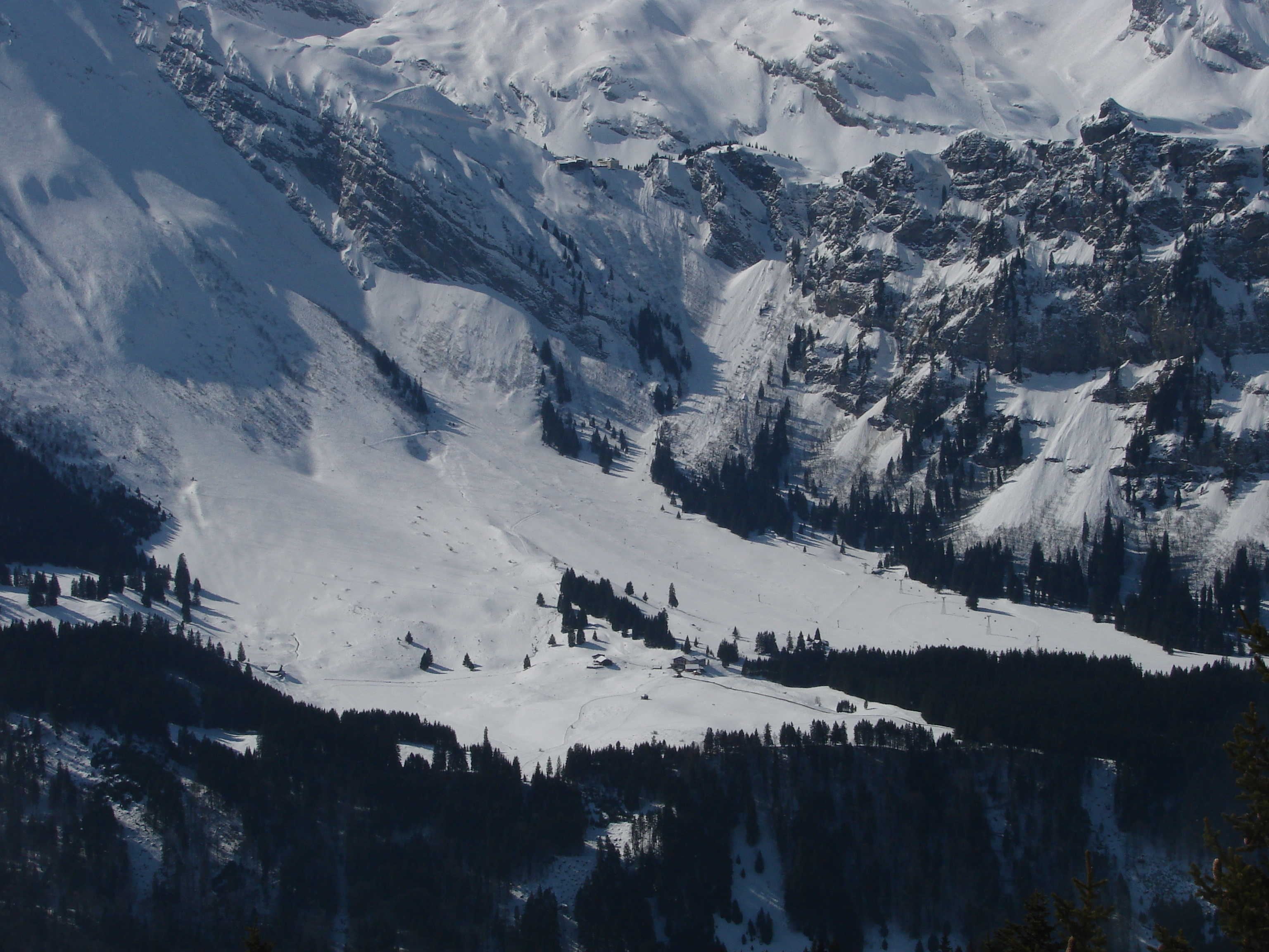 Snowy Gerschnialp, Switzerland